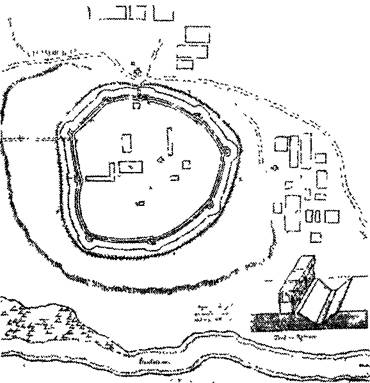 План г Усёрда Составлен в 1729 г. По сравнению с серединой XVII в сократилось число проезжих башен. Хорошо видно расположение крепости и пригородных слобод. Приведён разрез крепостной стены и рва. Подлинник хранится в Центральном государственном воечно-историческом архиве